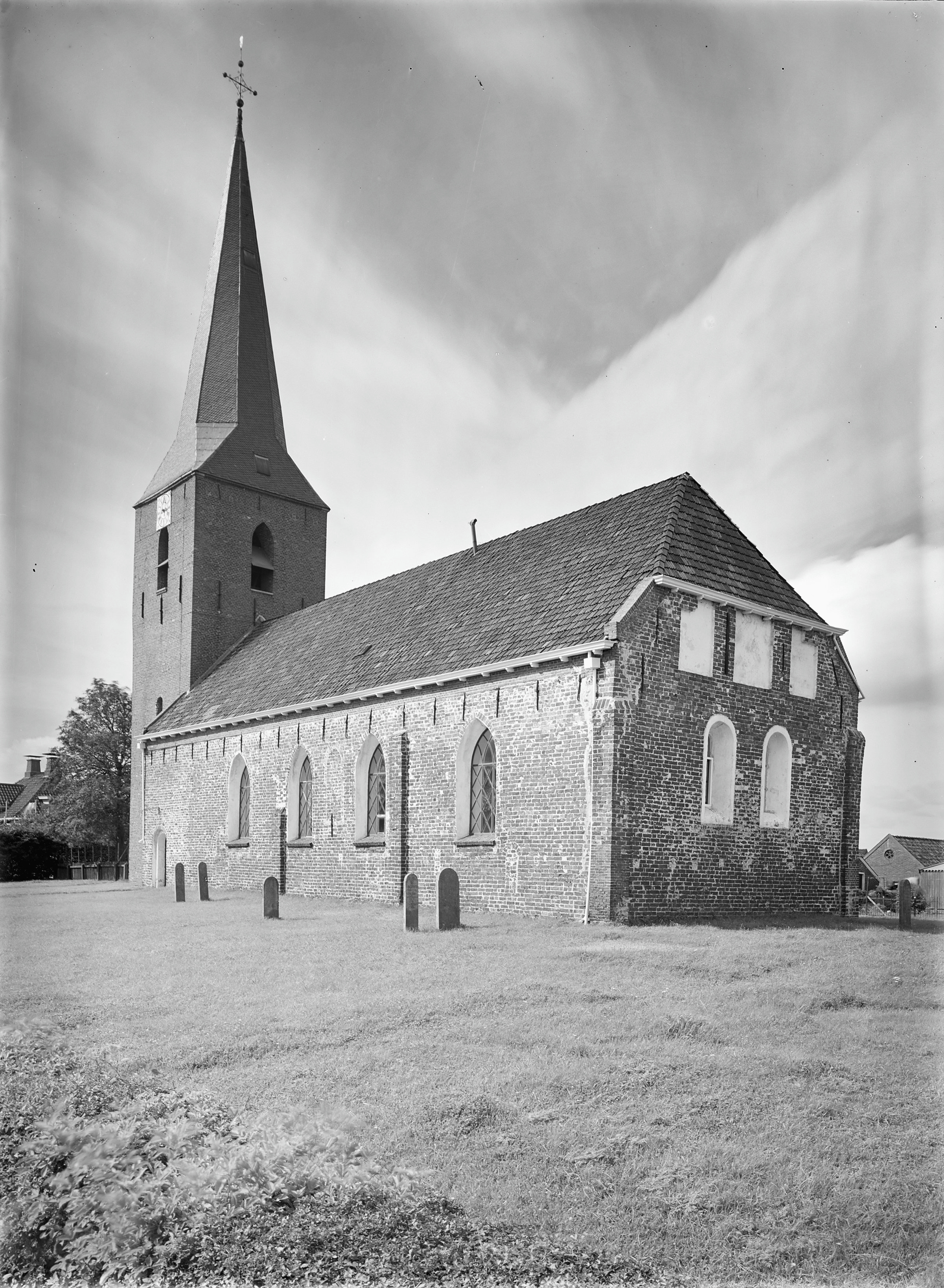 Nederlands Hervormde Kerk: kerk vanuit het zuid-oosten